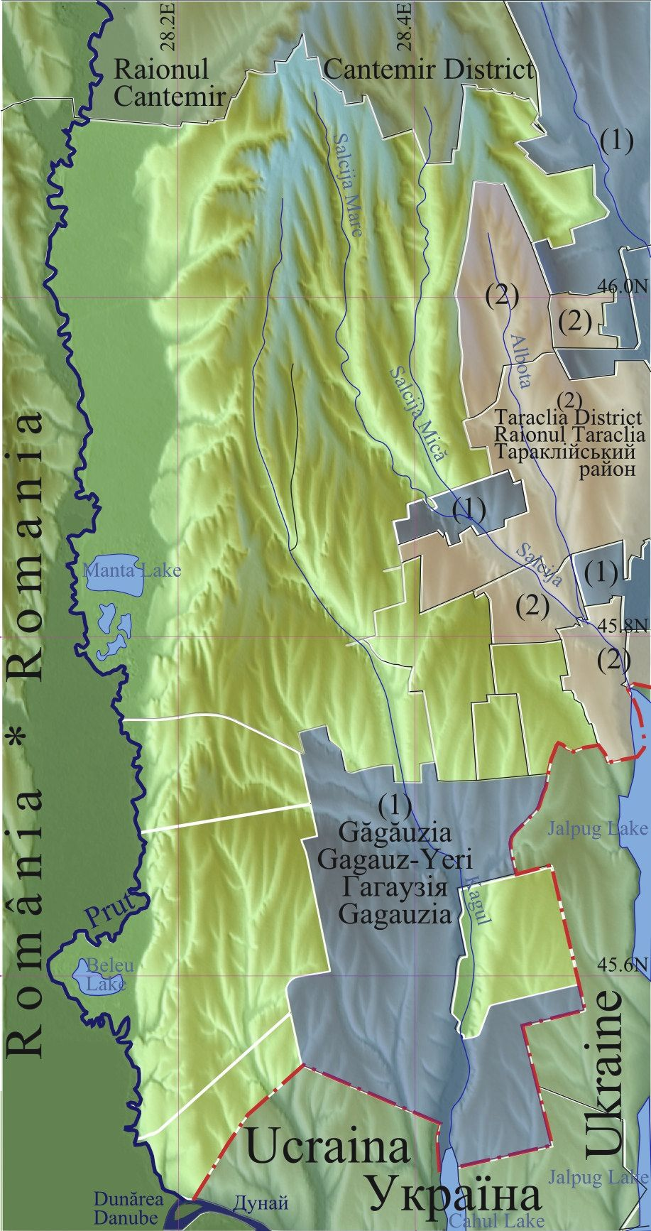 Harta de localizare Moldova Cahul. Pentru modificari accesati sursa SVG.